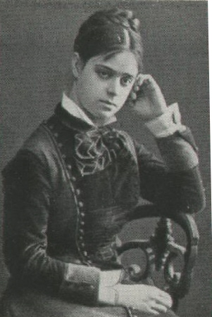 Изображение Евлалии Кадминой